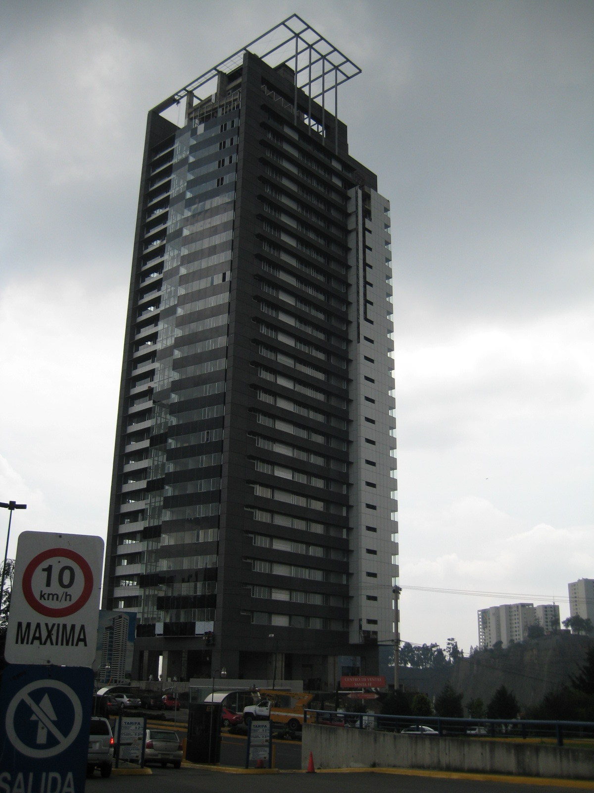 Edificio Punta Poniente